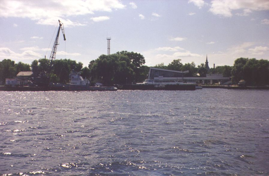 eo Laga haveno de urbo Ostasxkov (2004). ru Порт города Осташков (2004). La fonta bildo de cxi tiu bildo estas ankaux en mia propra retpagxaro [1] Mi, auxtoro de la bildo, permesas al cxiuj uzi gxin kun cxi tiuj kondicxoj